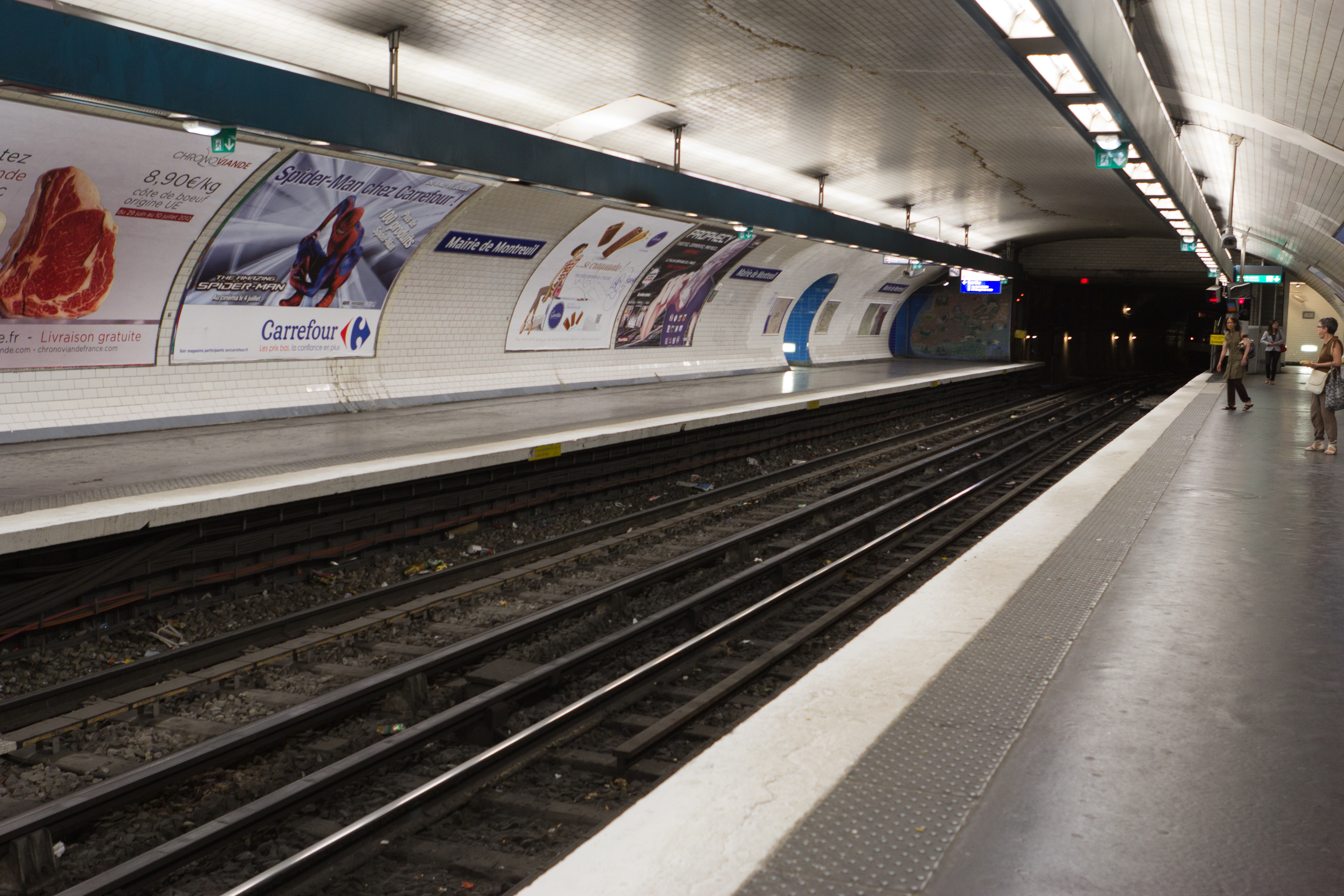 Station de métro Mairie-de-Montreuil, ligne 9 du métro de Paris (vue des quais), Montreuil, Seine-Saint-Denis, France